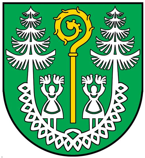 Herb gminy Zatory